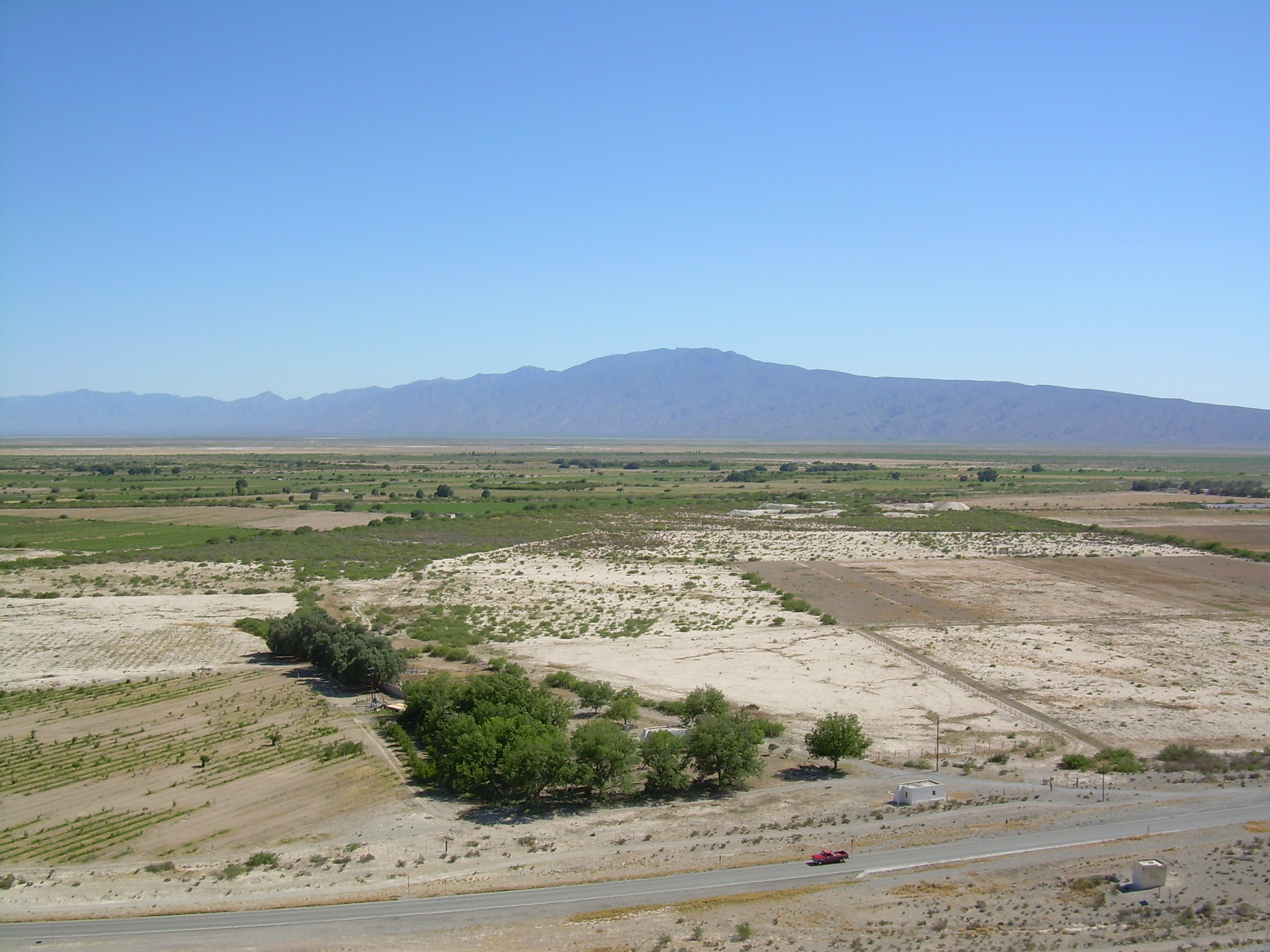 Una vista del valle de Cuatrociénegas, tomada desde la estatua de Venustiano Carranza.